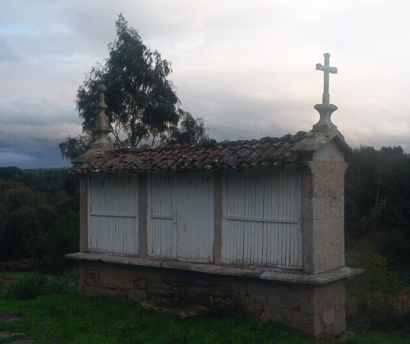 Hórreo de tres claros, sobre soleira de mampostería. Cuberto con tella do país e adornado con cruz latina e lampión fusiforme. Na actualidade é o único exemplar que se conserva no lugar de Portocarreiro, na parroquia e San Martiño de Vilapoupre (Antas de Ulla)